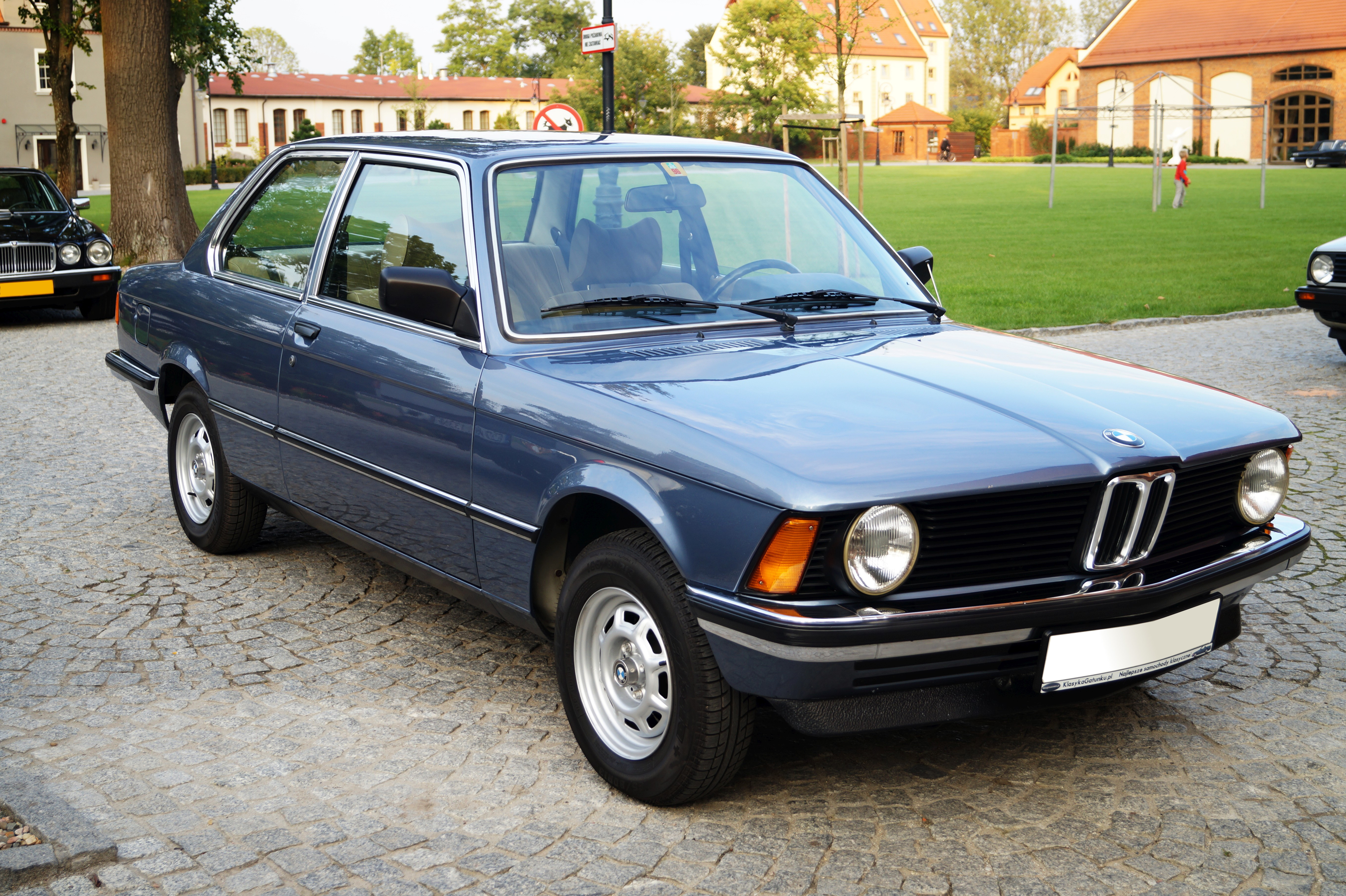 This photo was taken during Automotive Wikiexpedition 2016 set up by Wikimedia Polska Association.You can see all photographs in category Wikiekspedycja motoryzacyjna 2016. English | Polski | +/− Przód auta BMW 316 (model E21) w Muzeum Motoryzacji w Ślęzie